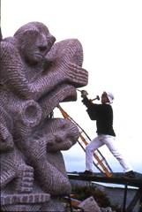 Shelomo Selinger travaillant le monument à la resistancve de la Courneuve